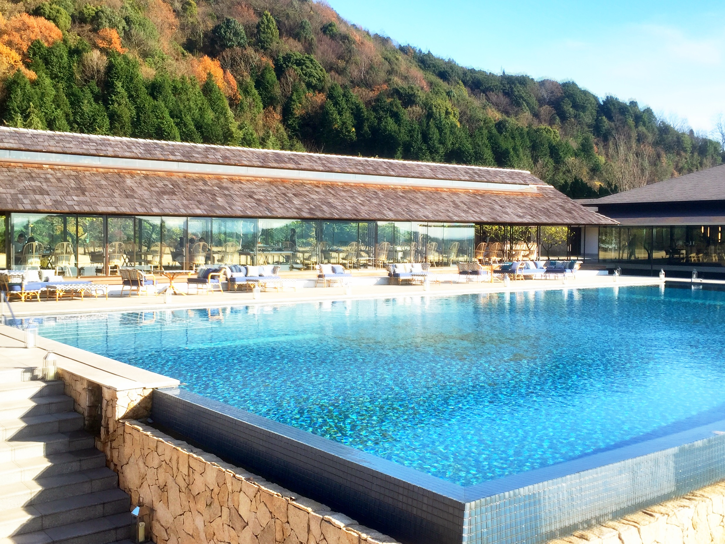 ベラビスタ スパ＆マリーナ尾道